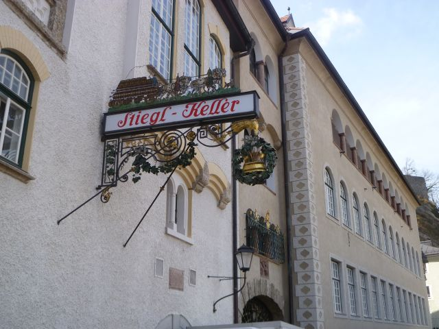 Stieglkeller-Festungsgasse